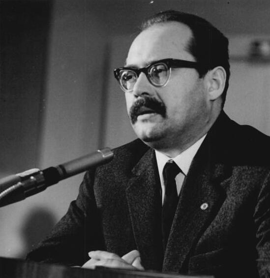 Zentralbild Hochneder 14.11.1966 Die 1. Jahreskonferenz des Deutschen Schriftstellerverbandes fand in der Zeit vom 2.11. - 4.11.66 in der Kongreßhalle am Berliner Alexanderplatz statt. 350 Teilnehmer der Konferenz (Schriftsteller, junge Autoren, schreibende Arbeiter, Literaturwissenschaftler und Bibliothekare) berieten über die Entwicklung der sozialistischen deutschen Nationalliteratur. UBz: Bernhard Seeger während ihres Diskussionsbeitrages.